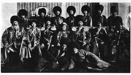 Туркменская депутация, прибывшая из Закаспийскаго края для принесения благодарности за Высочайшия милости, оказанные по случаю 25-летия присоединения Мерва. В депутации туркменских племен, подвластных России и насчитывающих более 300 000 душ, находятся: представительница мервских текинцев, вдова Нур-Верды-Хана, ханша Гюль-Джаман-бай (“Гюль” - роза, “Джаман” - лицо), и ея два сына: предводитель ахал-текинцев Махтум-кули-хан и Юсуф. Ханша имеет Высочайшия награды: почетный золотой пояс, парчовый халат и получает пенсию. Ханше теперь 65 лет.